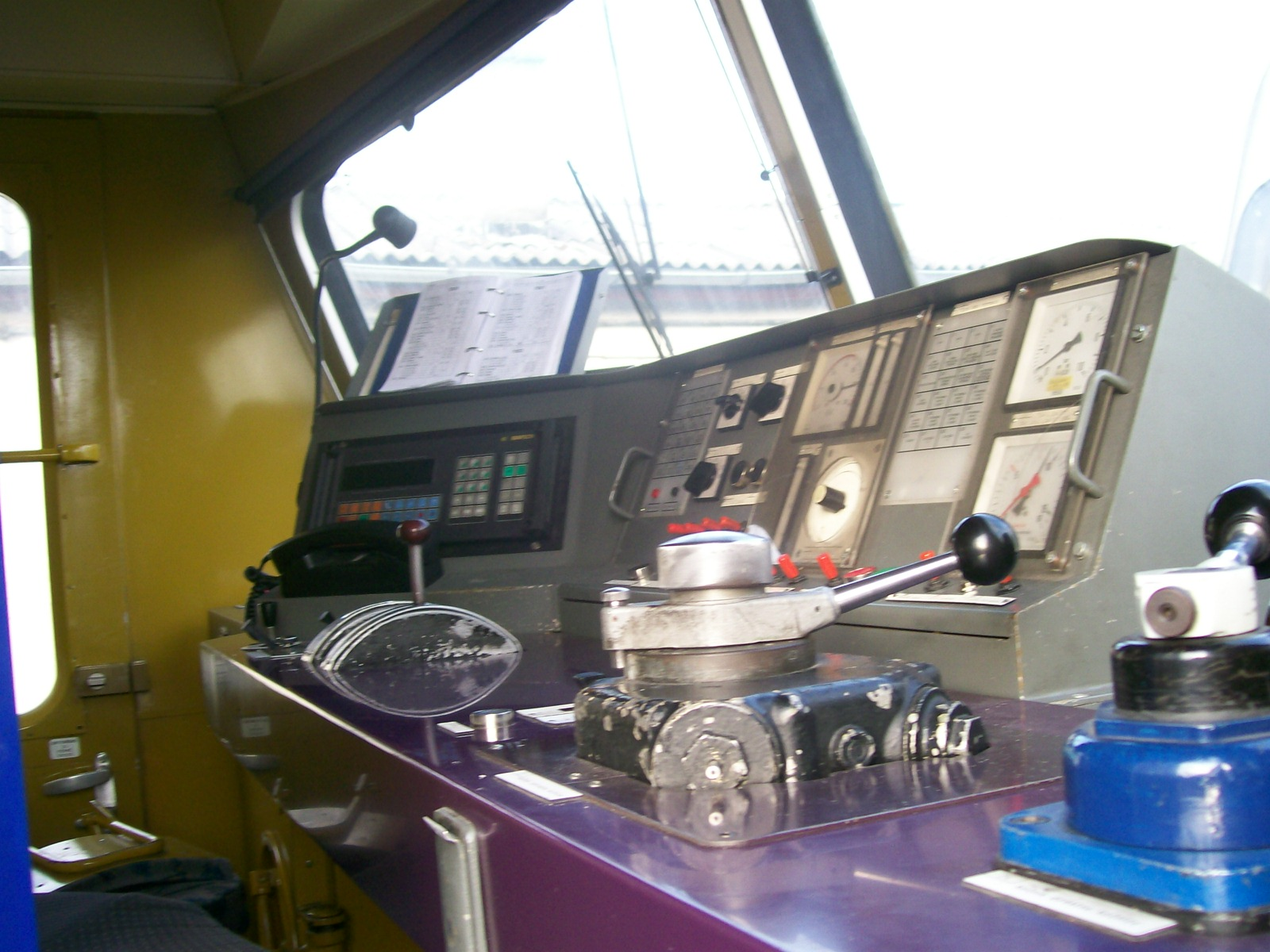 HŽ 6111 cabine (Vozačka kabina)